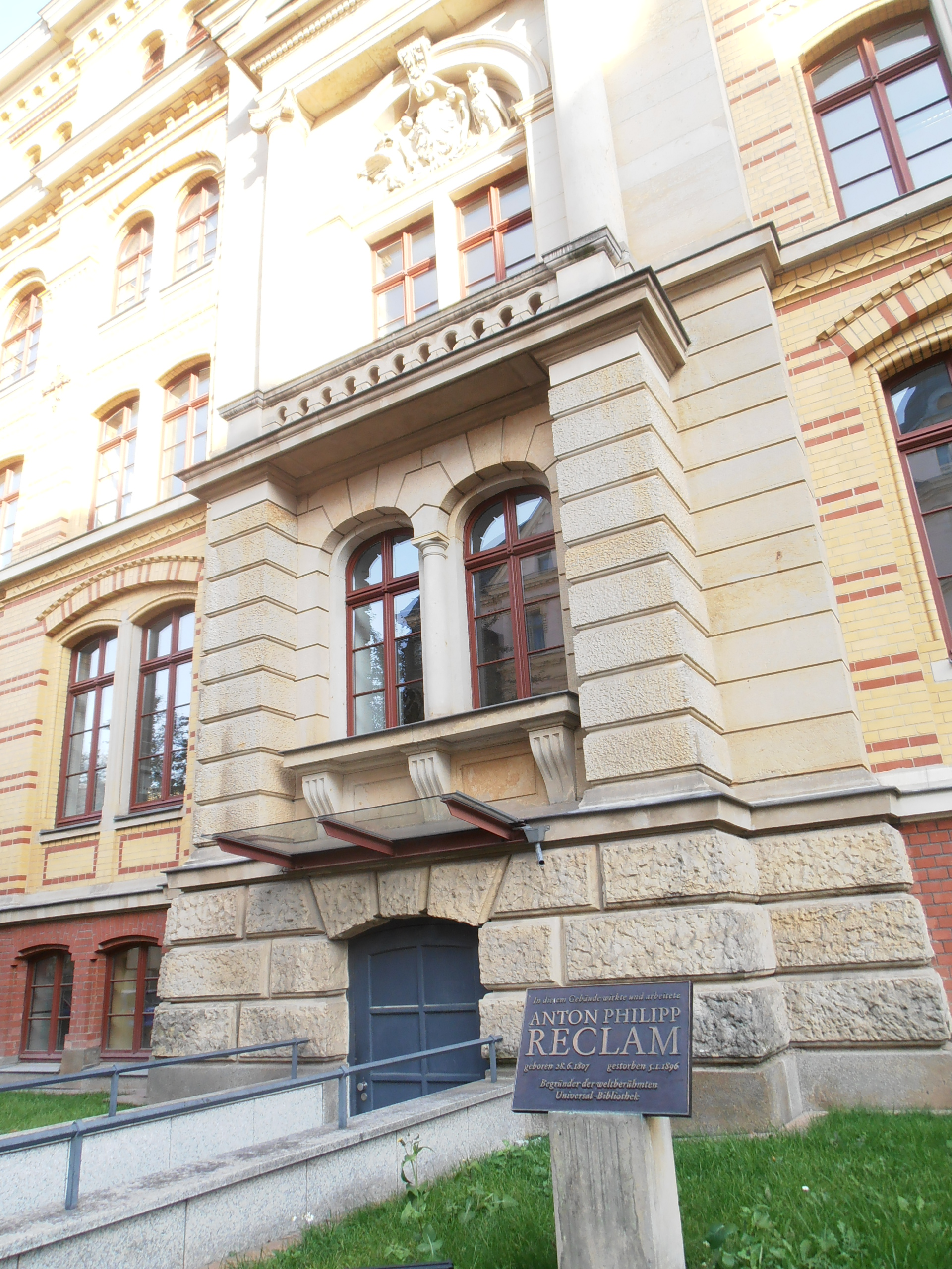 Tafel in Leipzig auf der Inselstraße Inschrift: In diesem Gebäude wirkte und arbeitete ANTON PHILIPP RECLAM geboren 28.6.1807 gestorben 5.1.1896 Begründer der weltberühmten Universal-Bibliothek